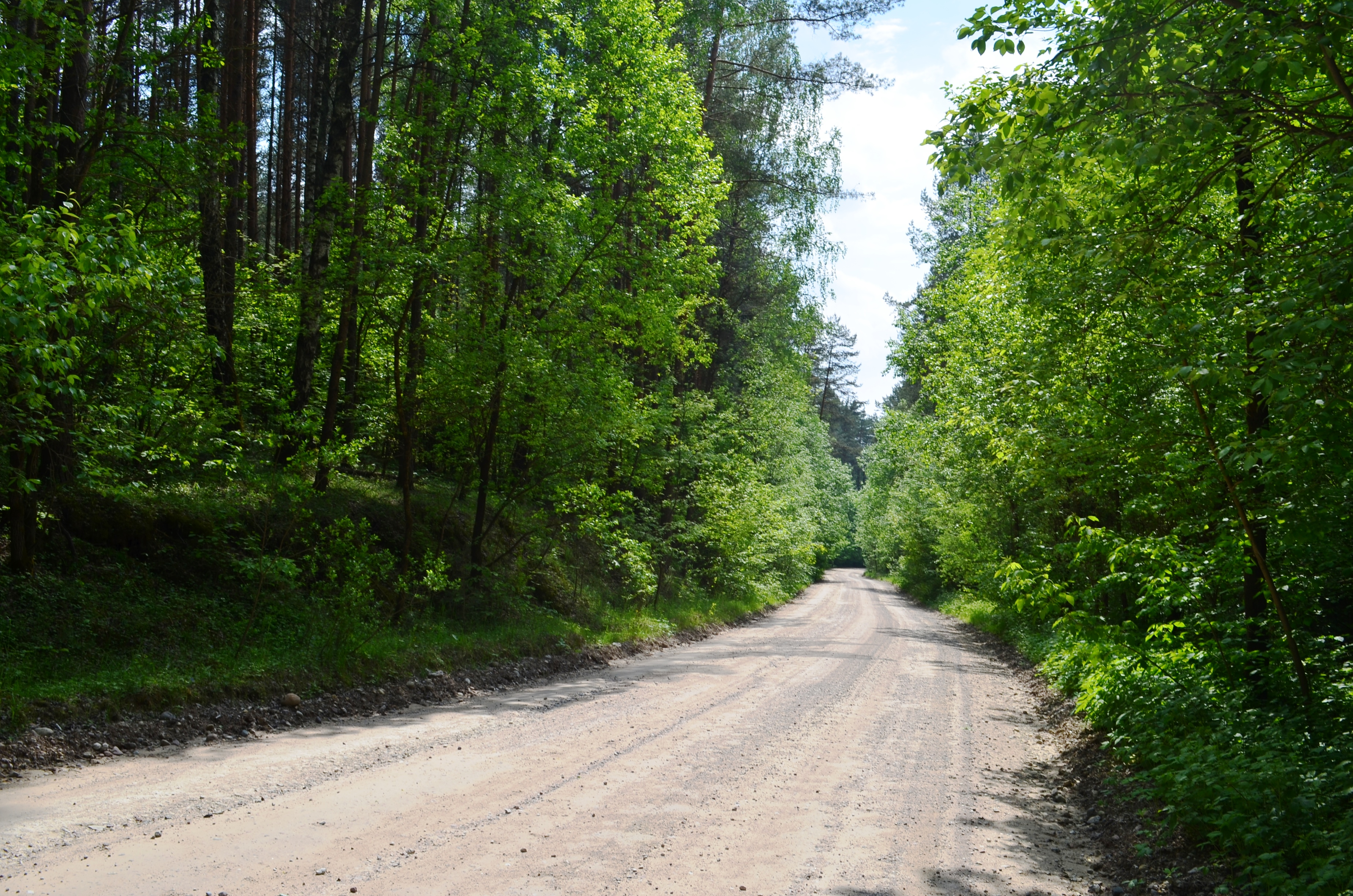 Girulių miškas už Gudelių, Vilniaus raj.